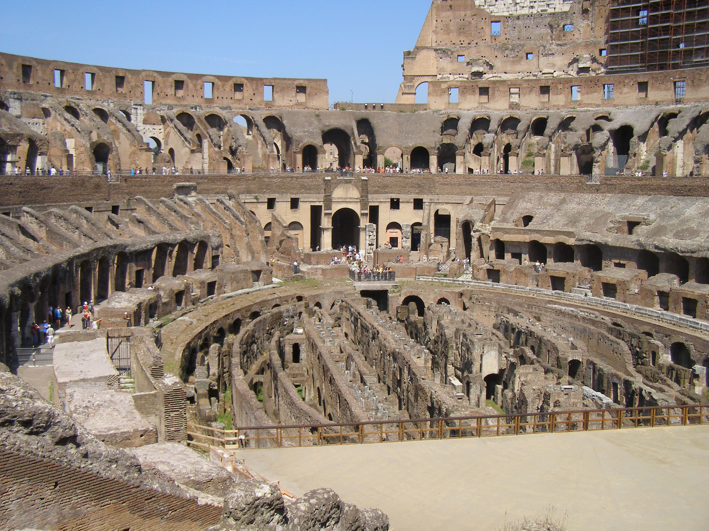 Il Colosseo Di ROMA